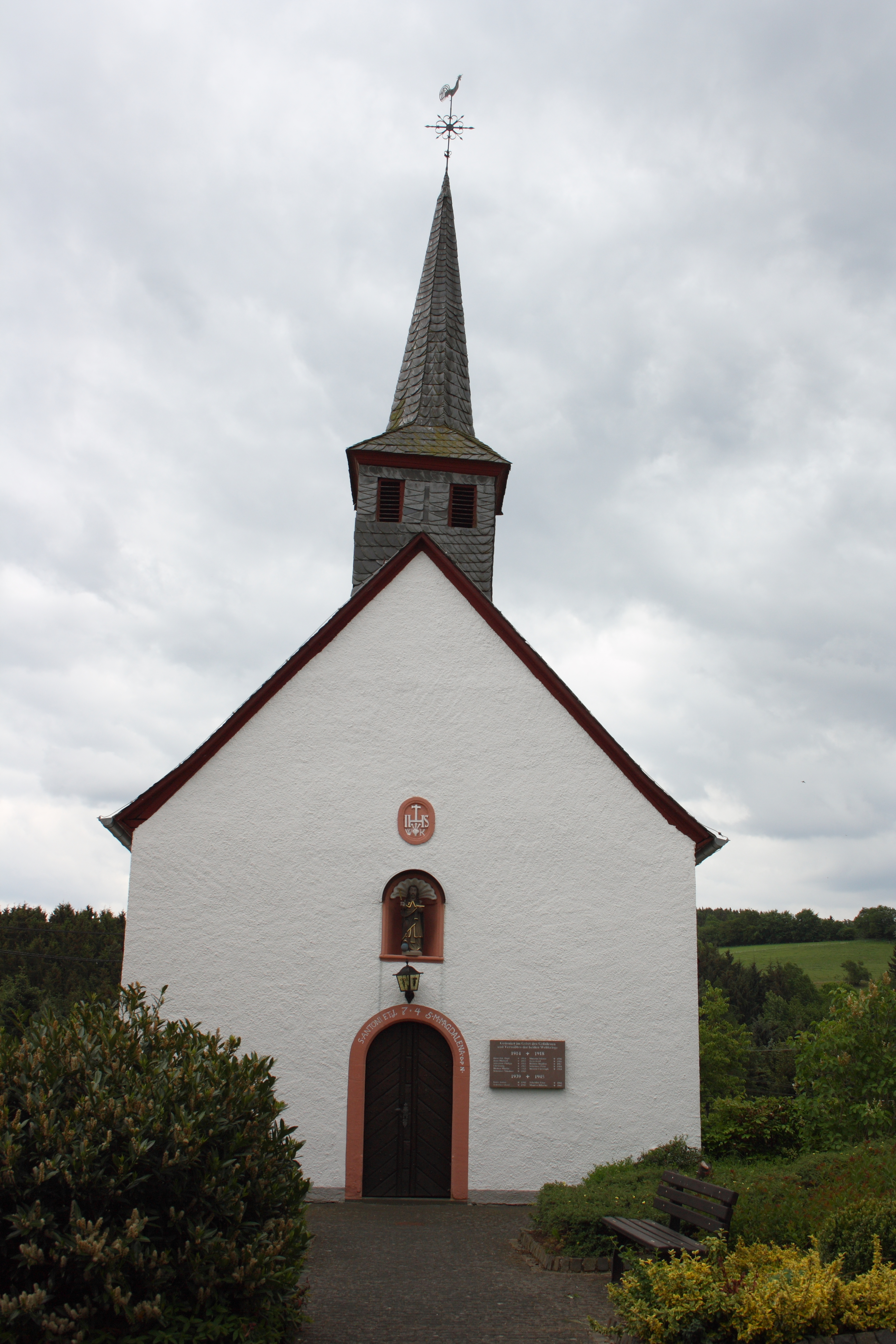 Katholische Filialkirche St. Antonius in Heyroth